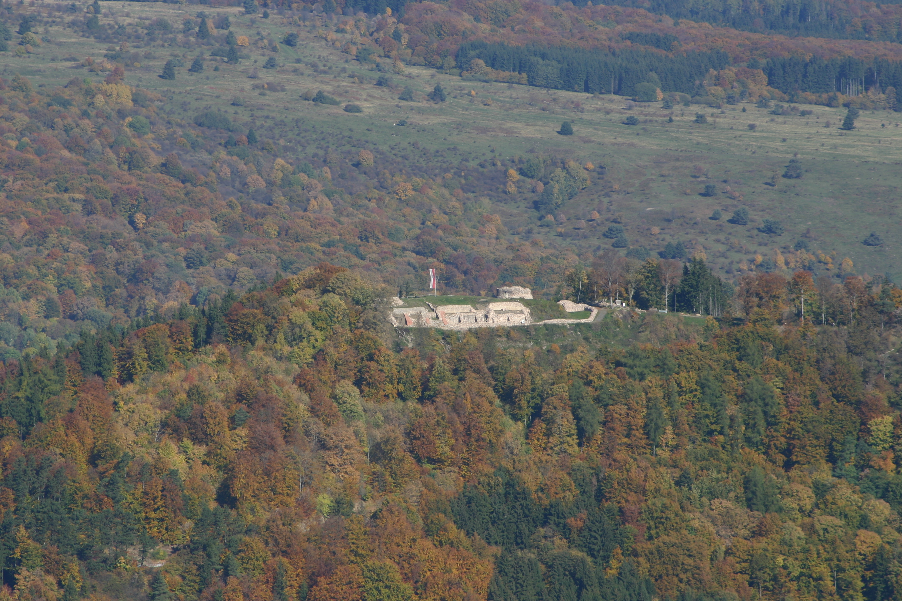 Blickrichtung Osterburg